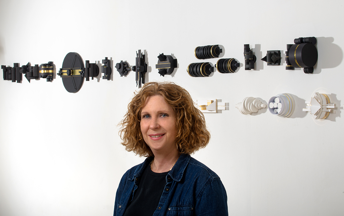 האמנית נגה יודקוביק - עציוני